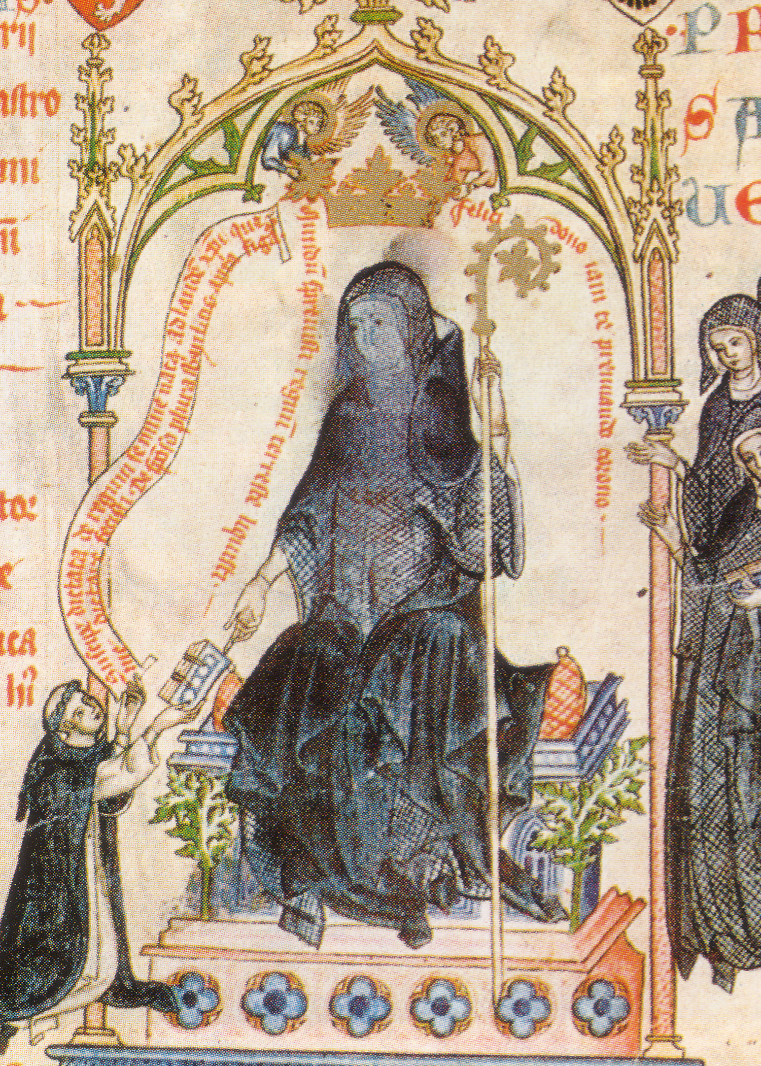 Kunegunda Czeska